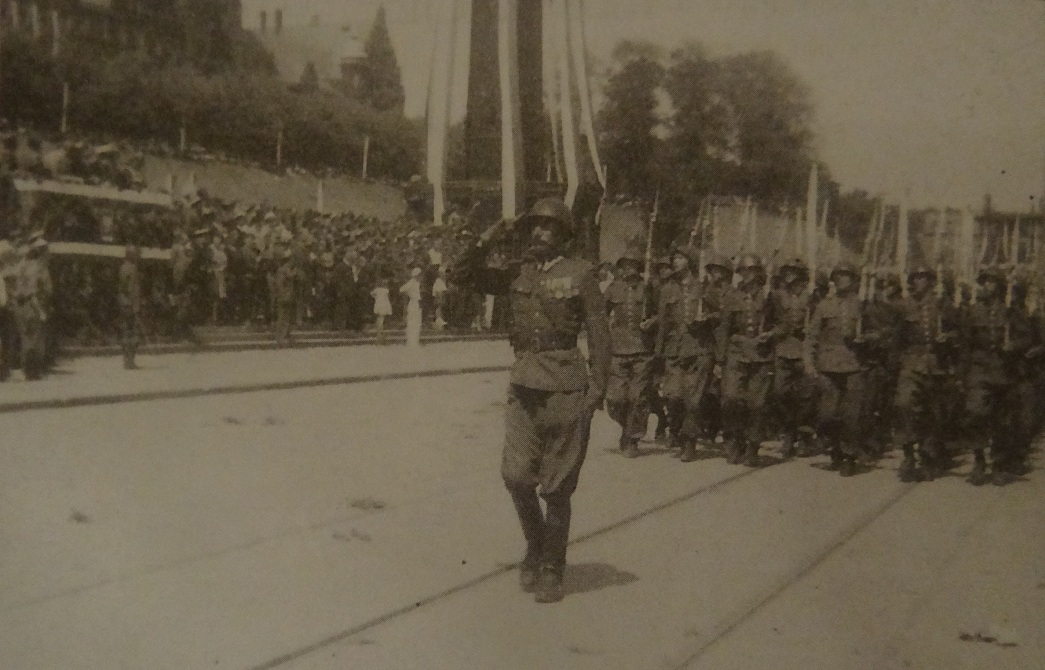 Szczecin 1947 r. 43 pp na Wałach Chrobrego podczas uroczystości wręczenia sztandaru. Prowadzi kpt. Zbigniew Fedyk